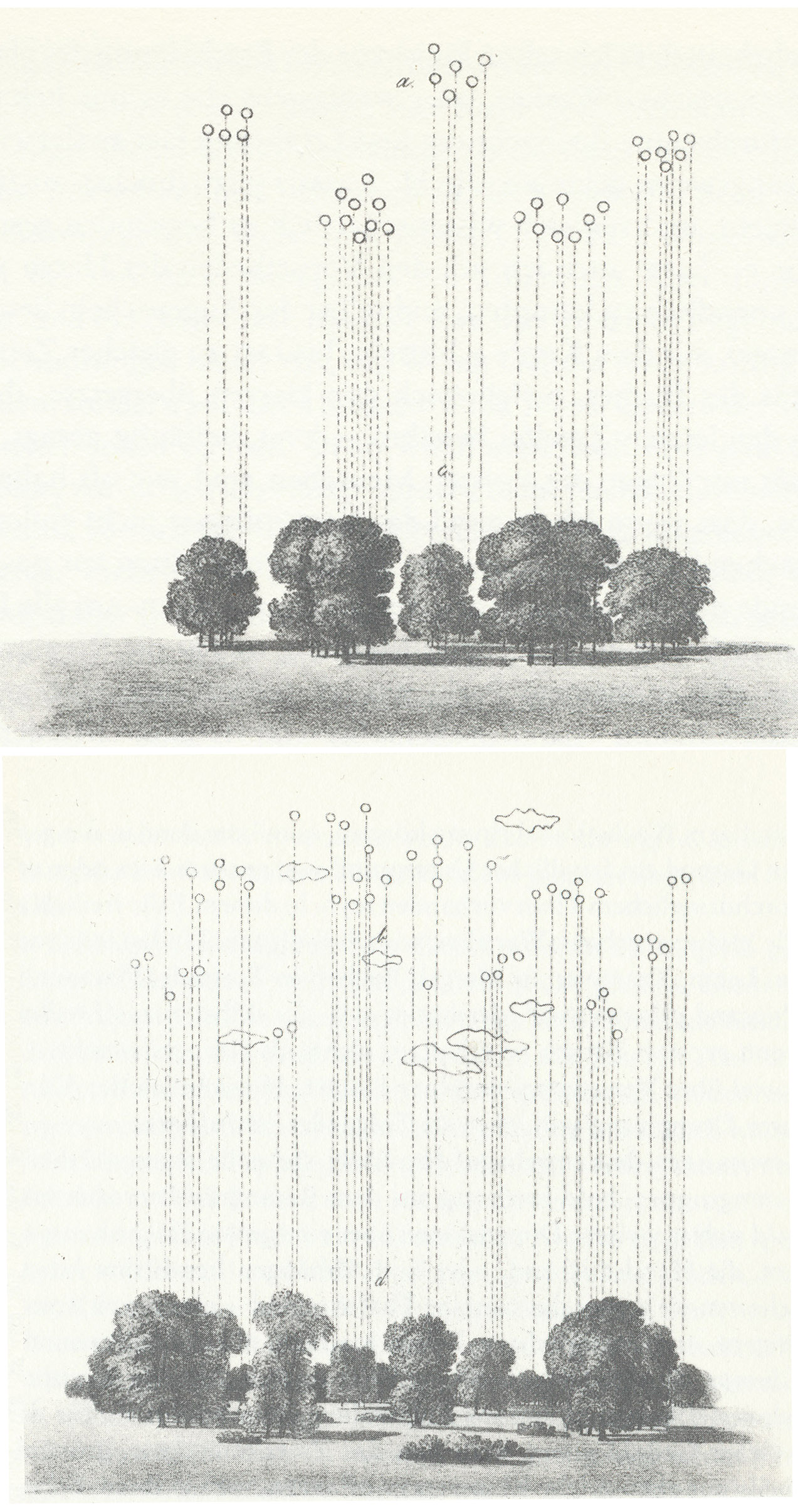 Anweisung für Baumgruppenpflanzungen des Fürsten Pückler